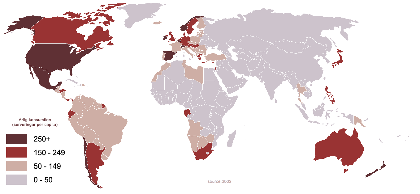 Colakonsumtion per capita för år 2002